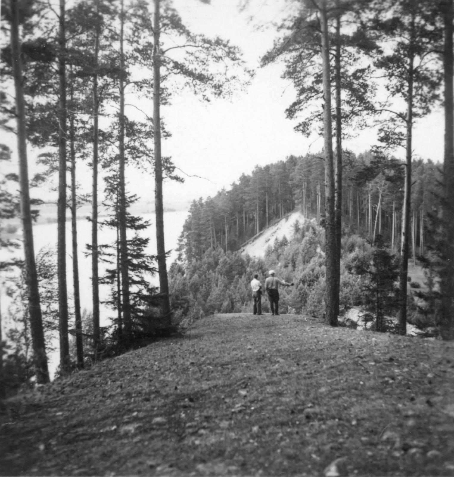 Kuvaaja Esko Aaltonen 1953. Kirmunharjun vanhalta kirkkotieltä kuvattu luoteeseen päin.